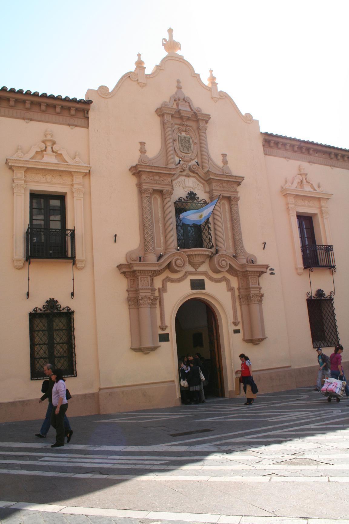 Colegio Nacional de Monserrat, Córdoba, Argentina.